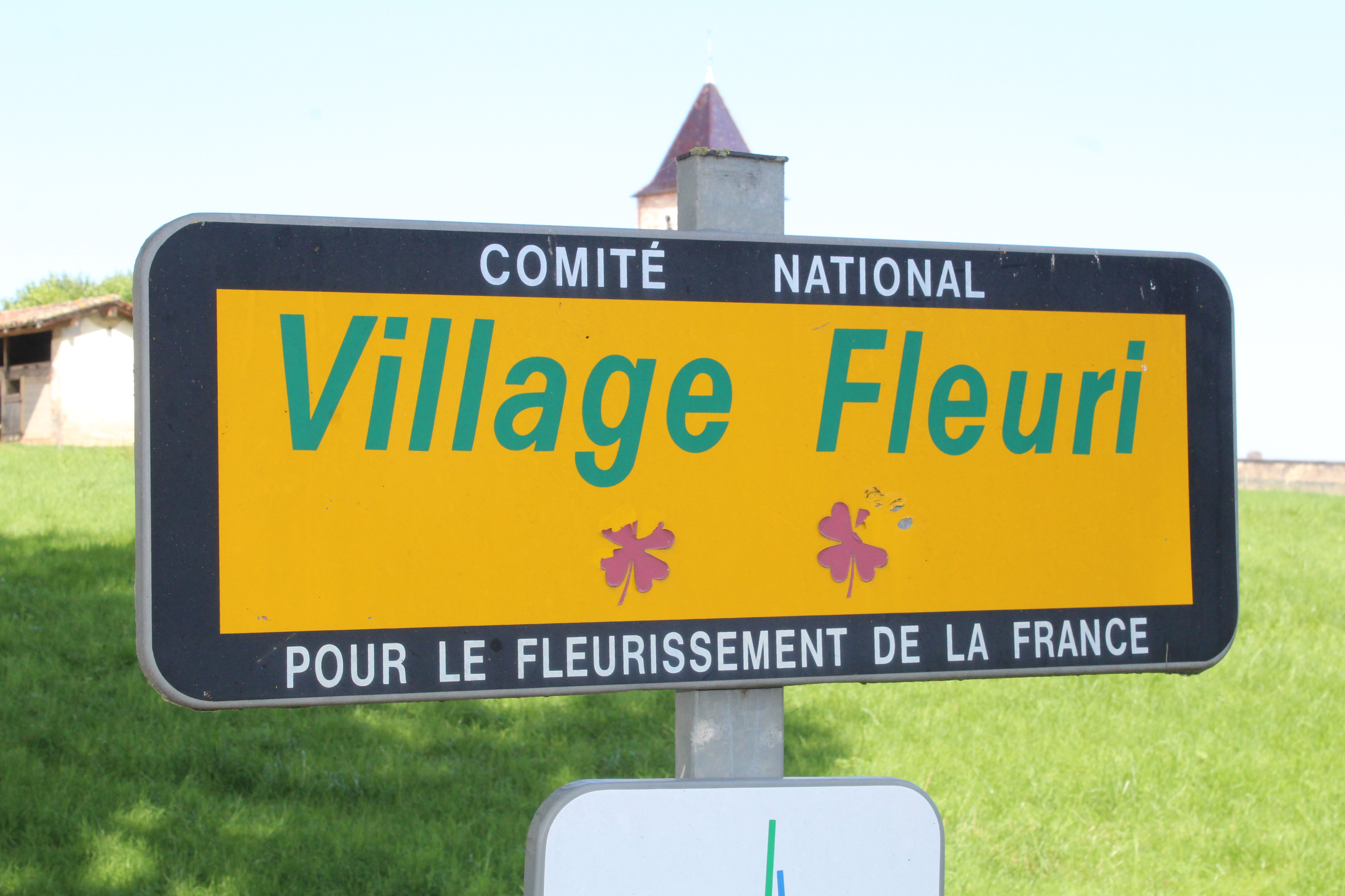 Panneau village fleuri avec 2 fleurs à Biziat.